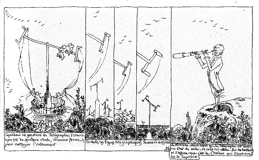 Bande dessinée de Rodolphe Töpffer, datant de 1831, sur laquelle on peut voir un télégraphe Chappe.